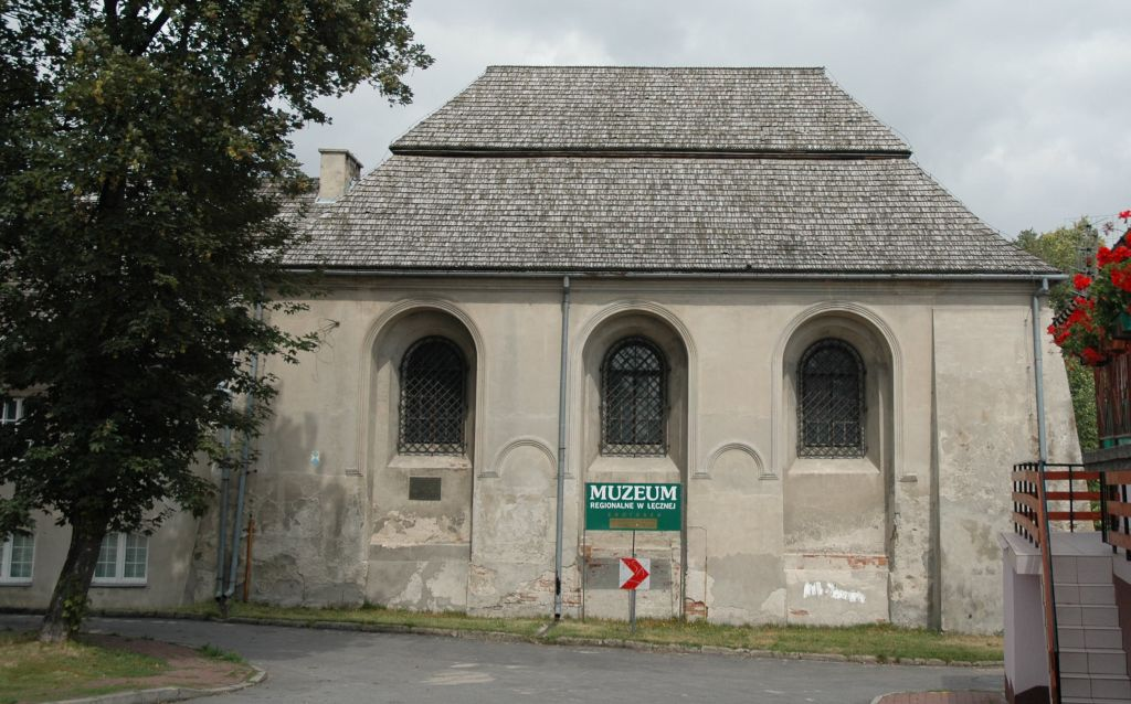 Poland, Leczna - synagogue.